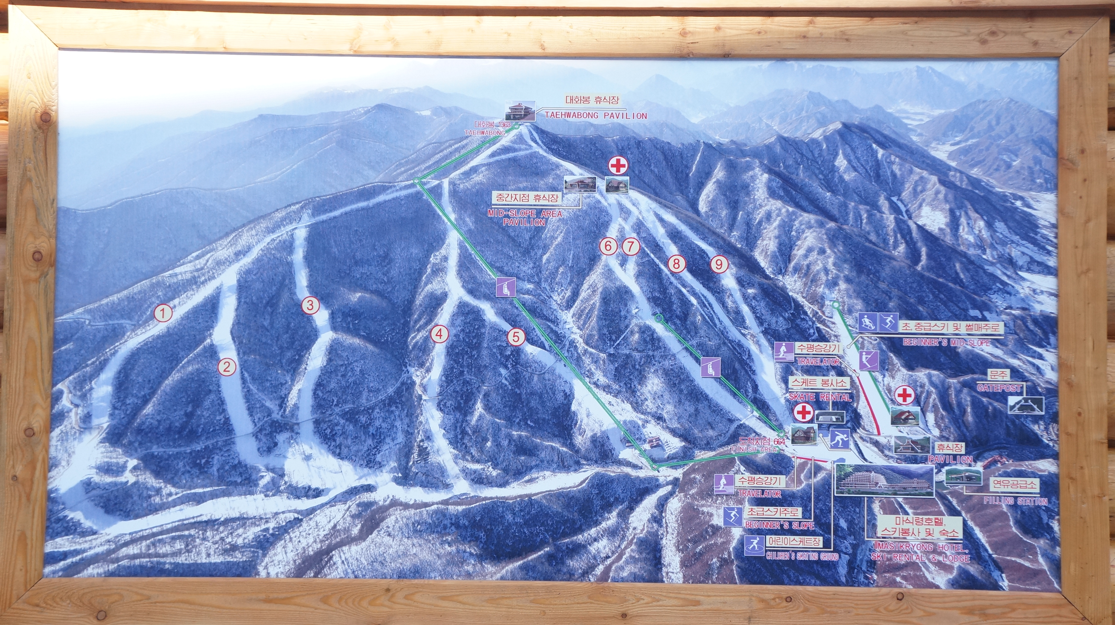 Ski trail map of Masik Pass